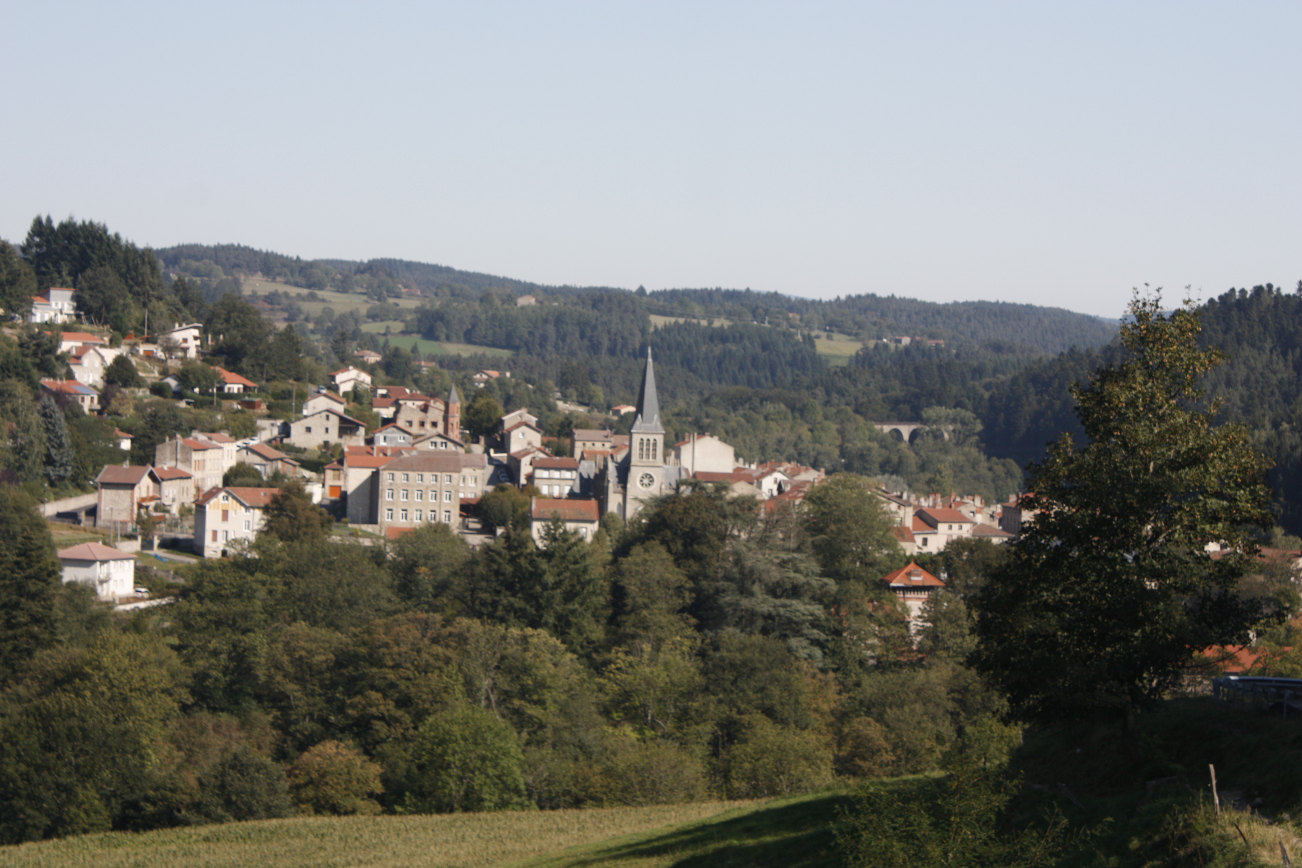 La Séauve sur Sémène